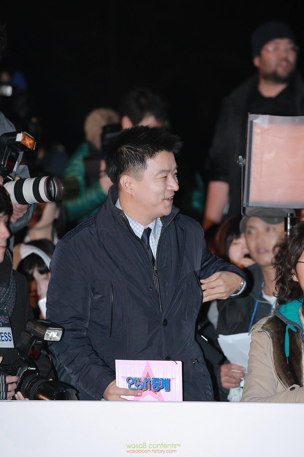 제34회 청룡영화상